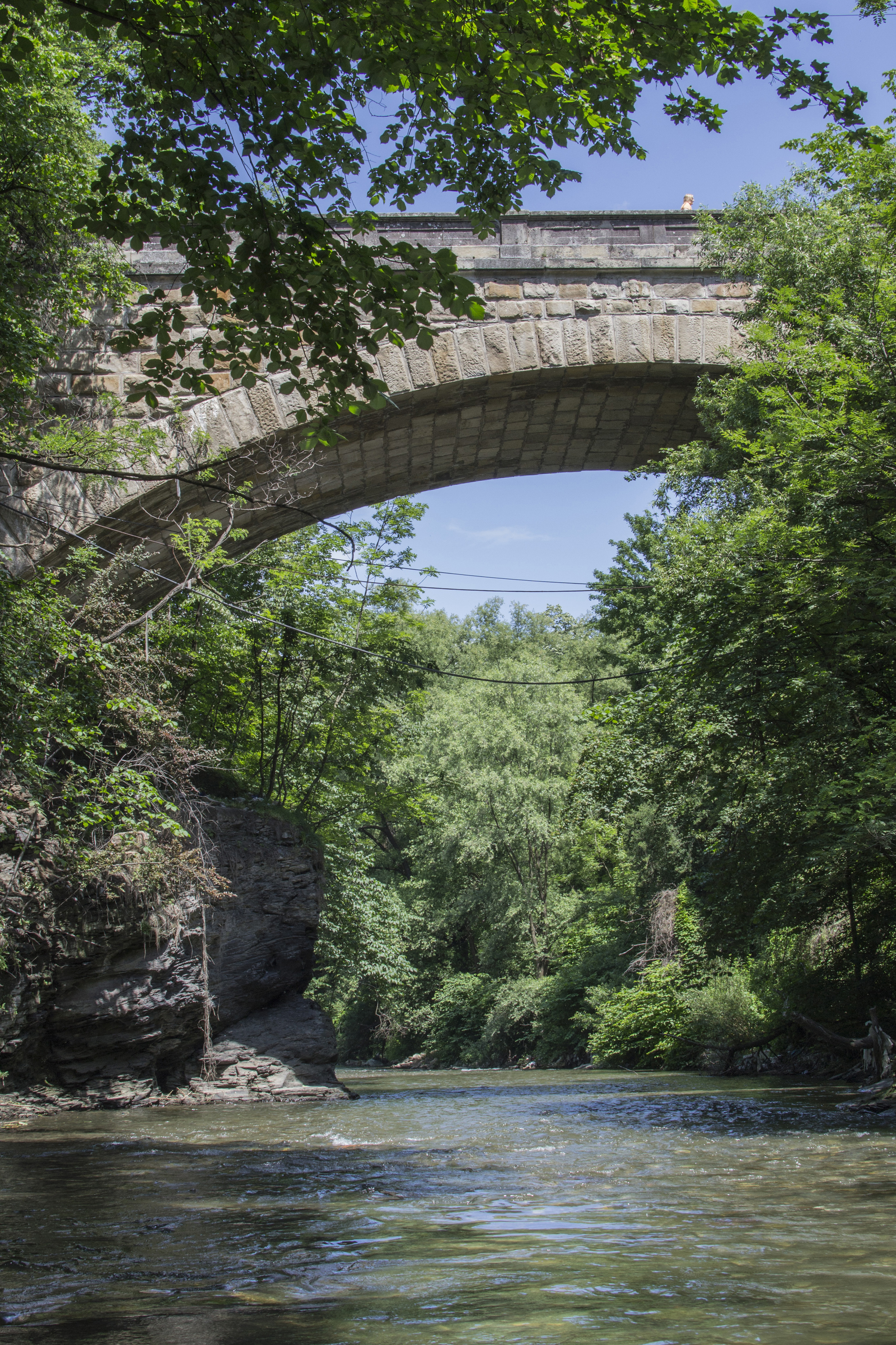 Део градског центра Ивањице